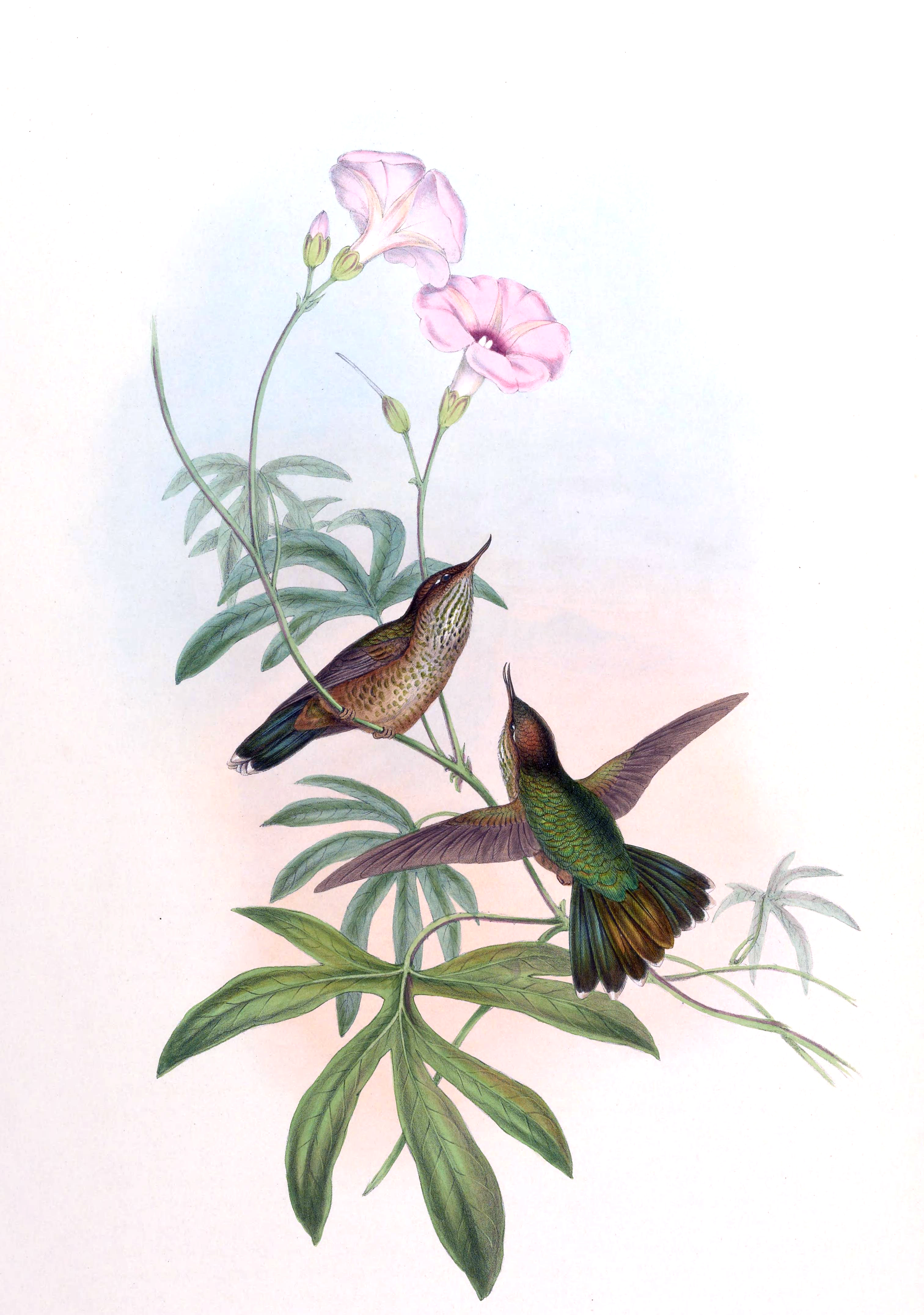 Opisthoprora euryptera = Avocettinus eurypterus in John Gould's Hummingbirds, ISBN 978-1555216610